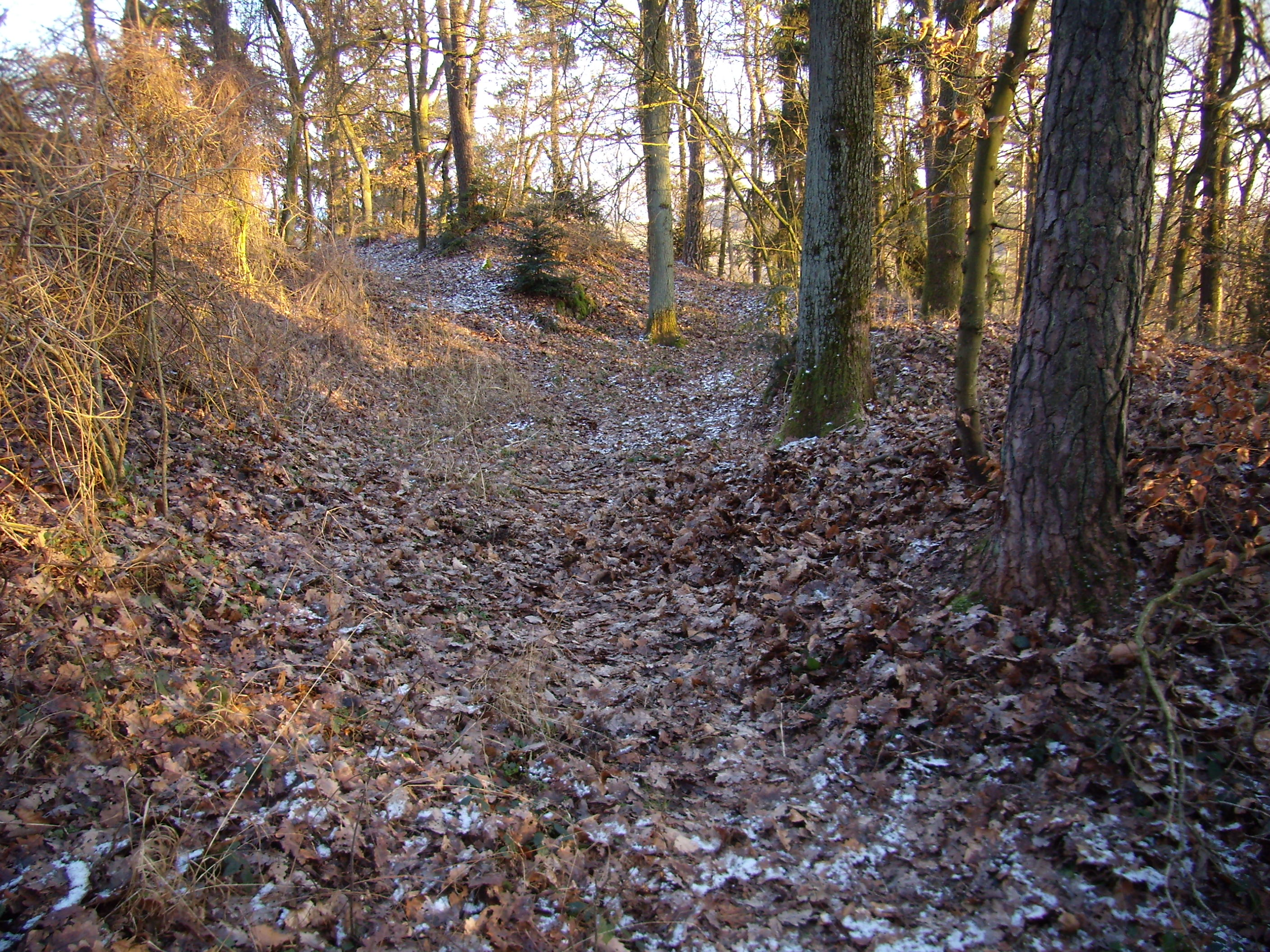 Reste von Altaist heute